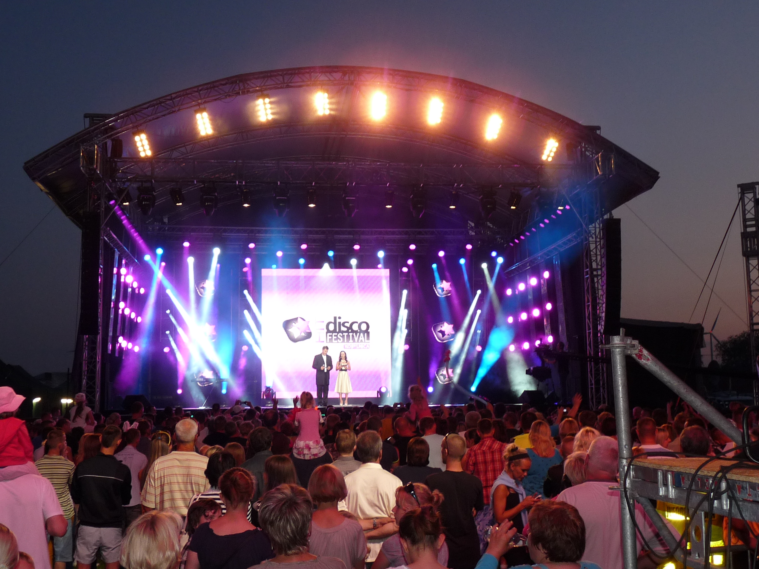 Disco Hit Festival - Kobylnica 2012 (powiat słupski).